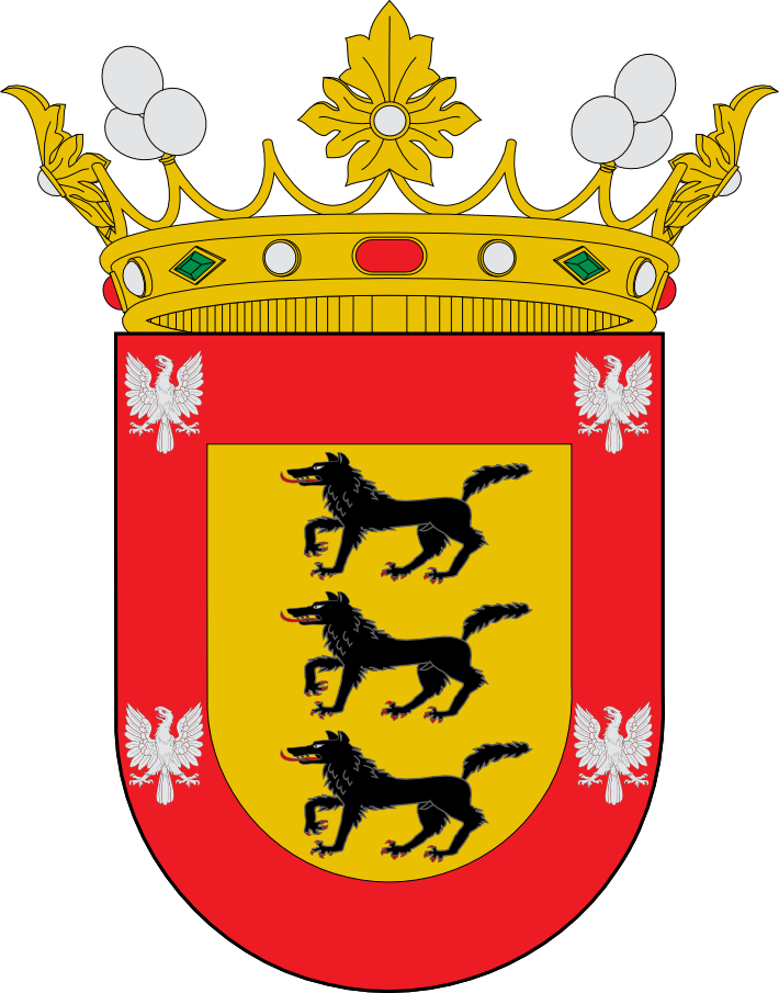 Urrezko eremuan hiru otso beltz ageri dira, bata bestearen azpian, armatuta eta gorri koloreko distirekin. Inguru gorria, zilarrezko lau arranoxka dituela. Guztiak, koroa izan ezik, biltzen dira zirkuluerdi baten gainean ezarritako laukizuzen batean. Markes koroak errubi, esmeralda eta perla apaindurak ditu, eta irudi geometriko horren gainean ezarrita dago. Aipatutako koloreen tonalitatea bateratzeko, bakoitzaren zenbakia zehazten da ondoren, Pantone gama normalizatuaren barruan: Urrea: Pantone 871. Zilarra: Pantone 877. Berdea: Pantone 356. Gorria: Pantone 485. Beltza: beltza.